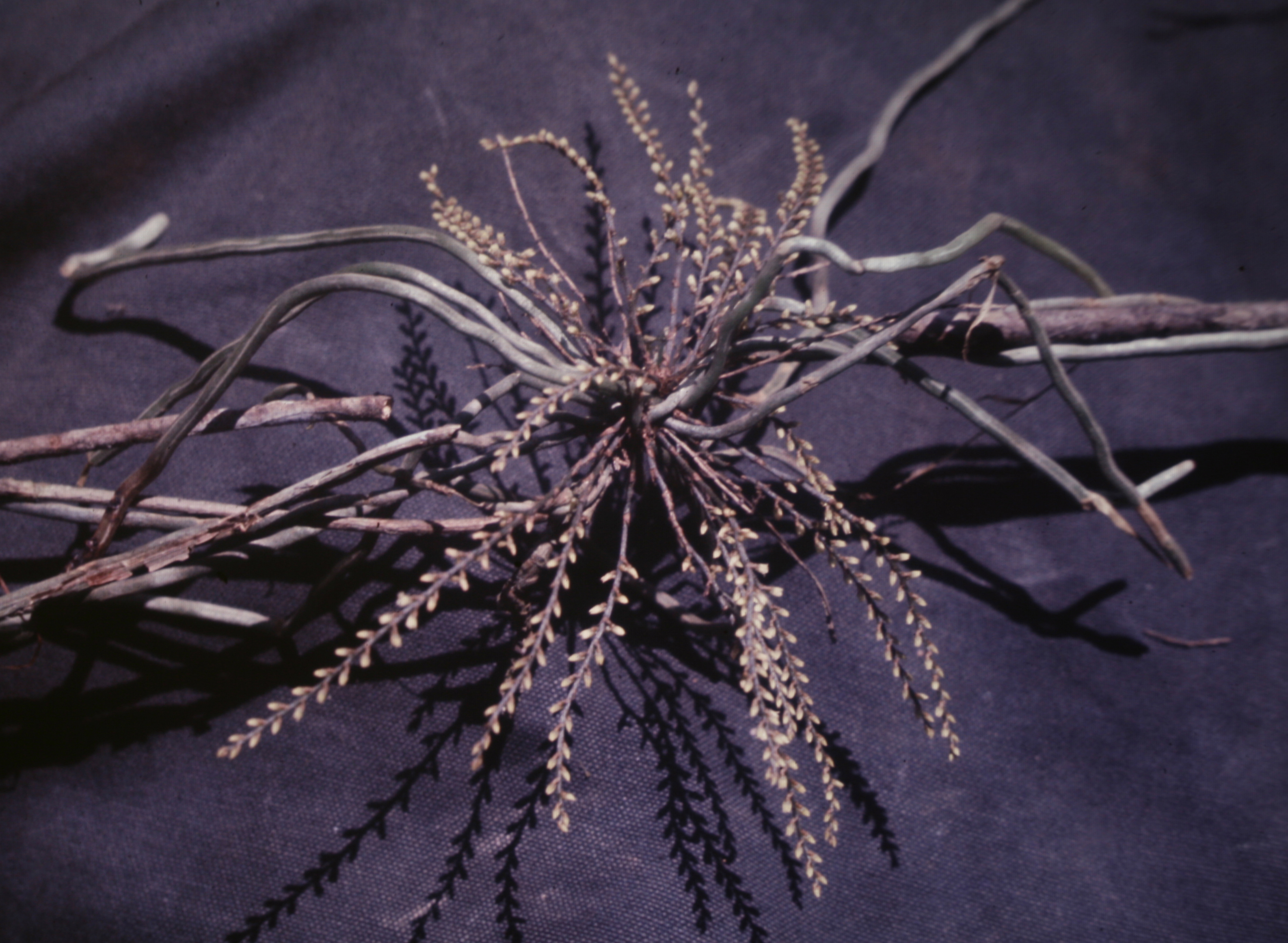 Campylocentrum fasciola, Suriname.